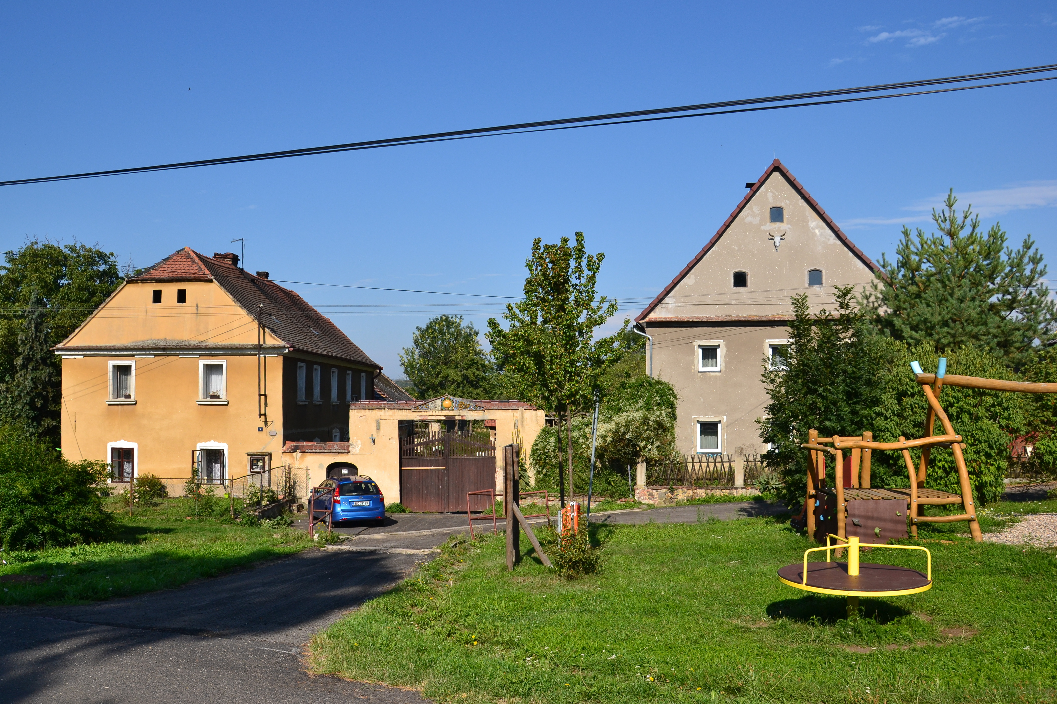 Usedlosti na návsi